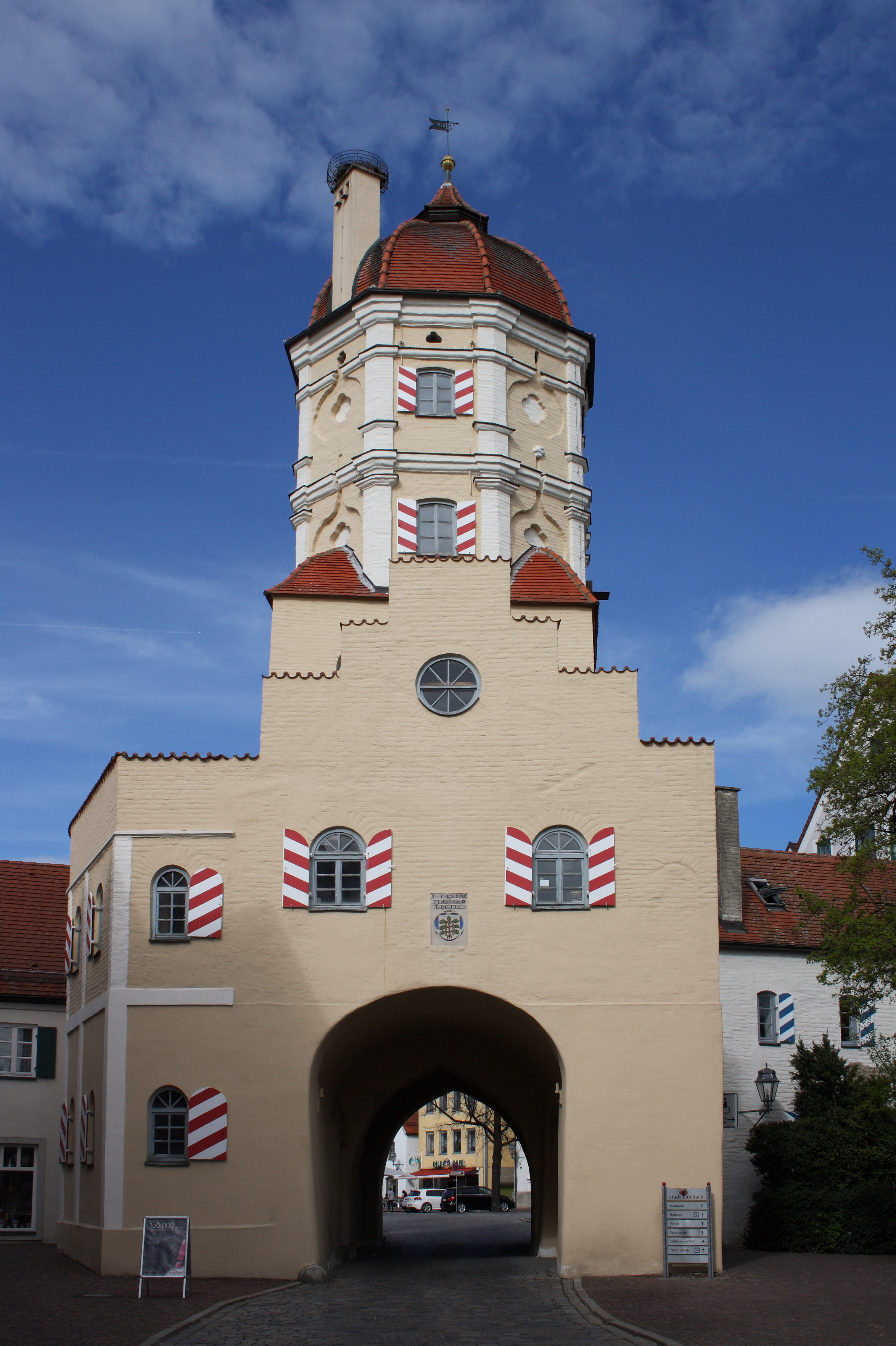 Oberes Tor in Aichach im Landkreis Aichach-Friedberg (Bayern)